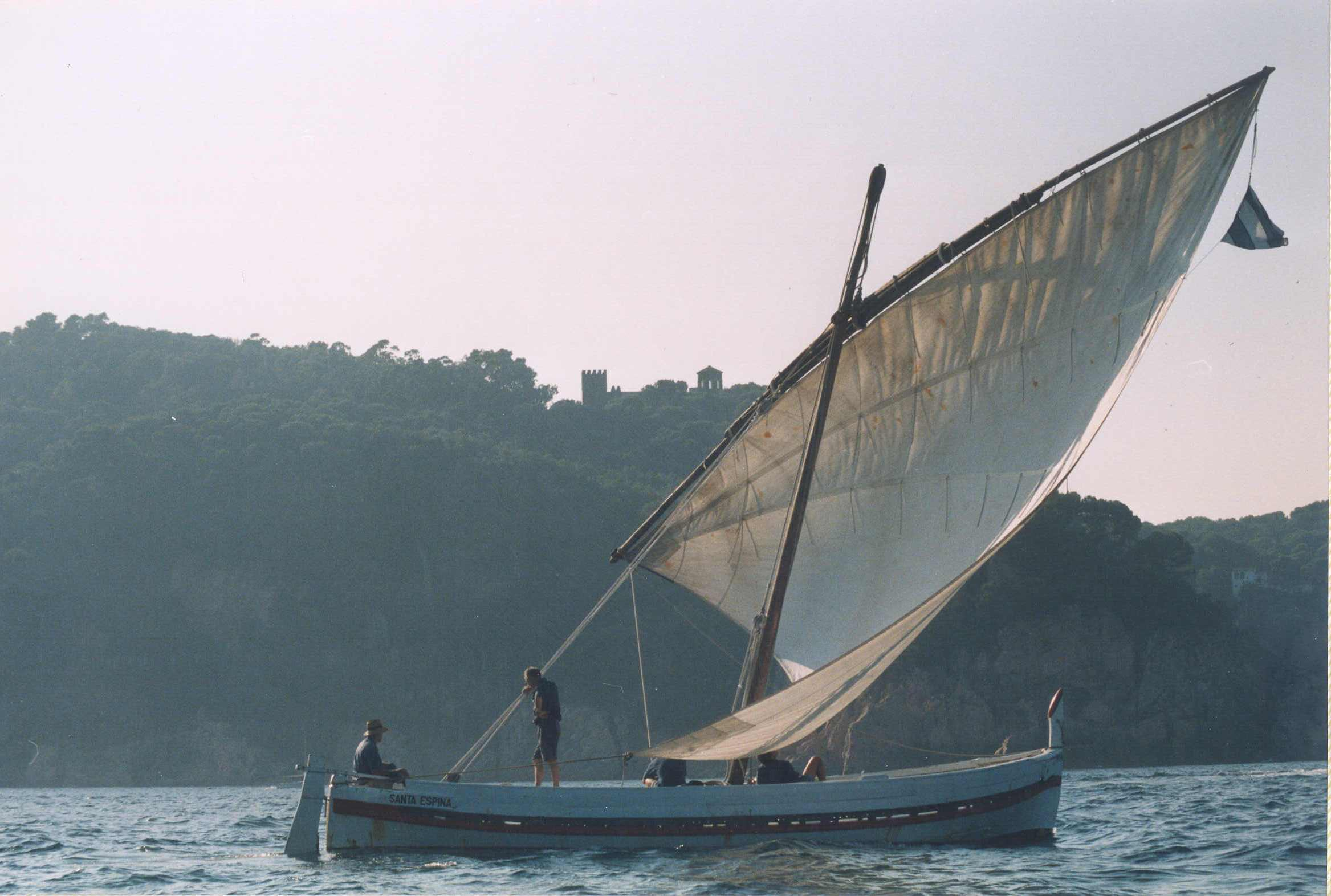 Navegant per les aigües de Calella de Palafrugell